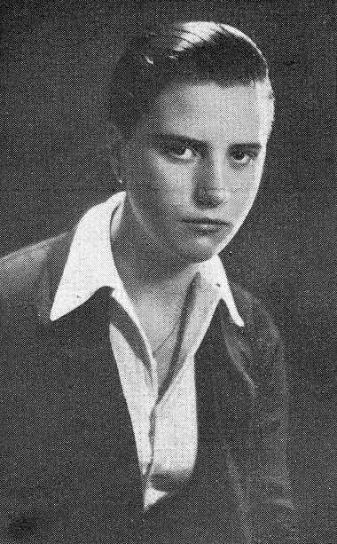 Amparo Alvajar, fotografía en Vida Gallega 1932